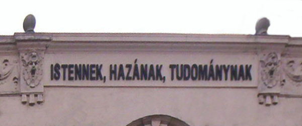 The motto of the Pápa Reformed College: "Istennek, hazának, tudománynak" ("To God, to fatherland, to science"), on the façade of the main buildingA Pápai Református Kollégium jelmondata: "Istennek, hazának, tudománynak", a főépület homlokzatán